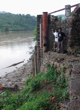 Medición del caudal del Río Marañón en Borja. Runa Simi: Marañun mayu, Borja llaqtapi.